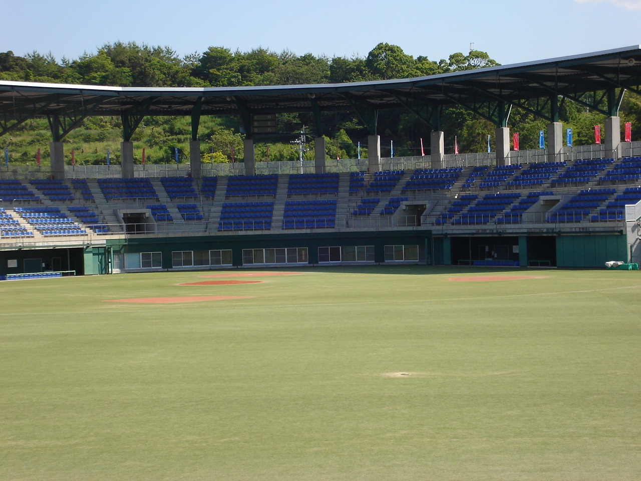 香美市秦山公園野球場。 - 日本国高知県香美市にある野球場。